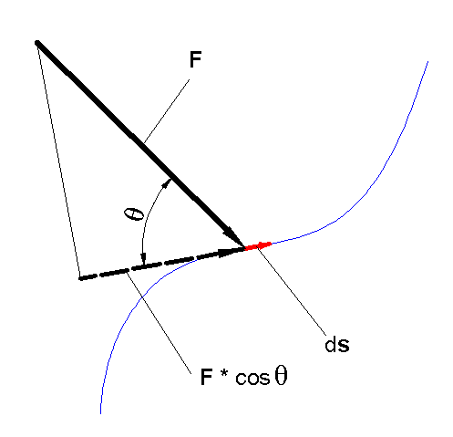 Anyagi pontra ható erő munkájának értelmezése általános esetben. (A pálya tetszőleges görbe, az erő nem a mozgás irányában hat)